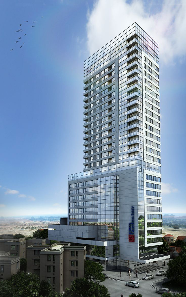 Render del Hilton Garden Inn de Neuquén. Arquitectos: Raúl Quadrini, Exequiel Rimmele (ASPA Patagonia). Construcción: 2014-19.